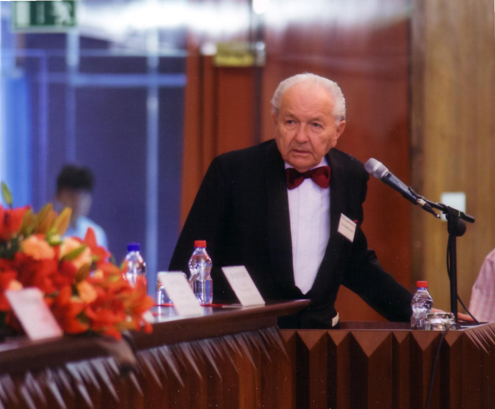 Ezen az ünnepségen az engedélyezett 10 perc helyett a 35. percben sikerült csak visszaszereznie az Elnökségnek a szót. Kedves jelenet volt ettől.